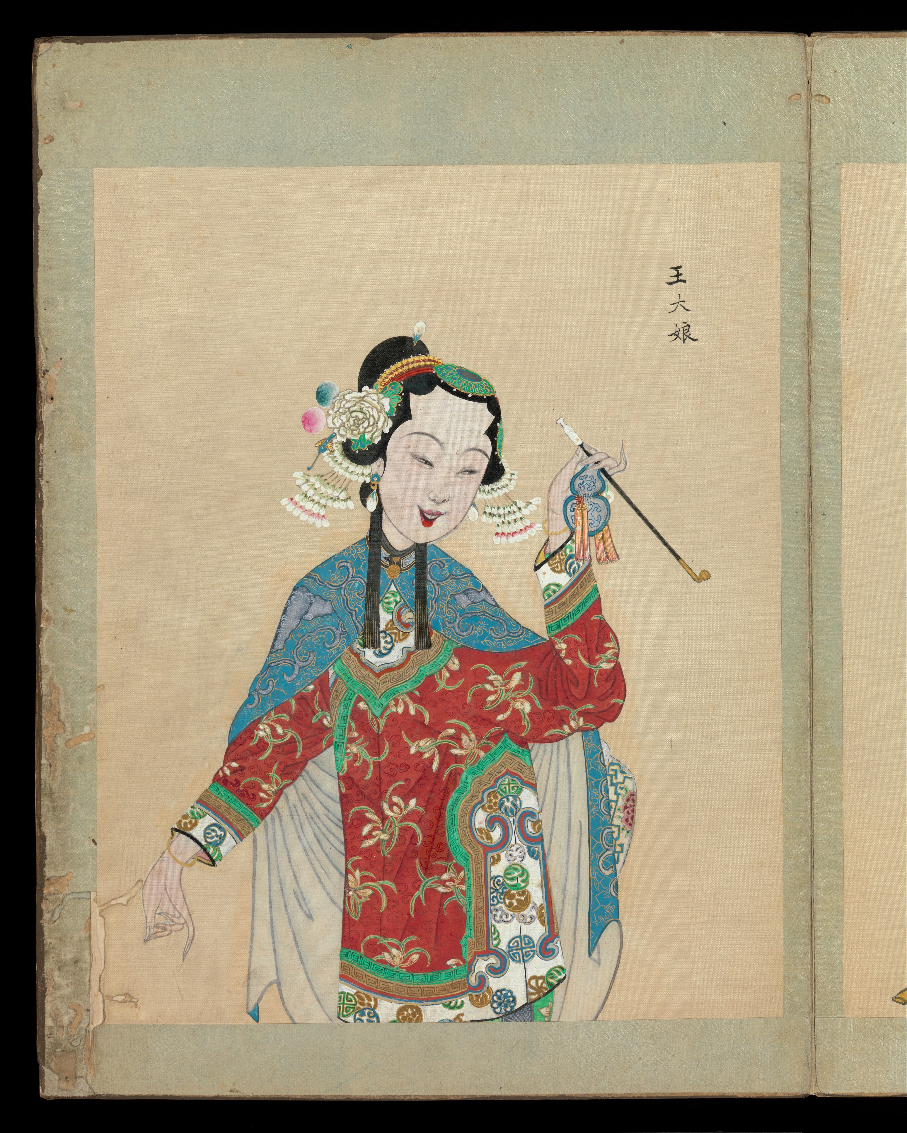 China; Album; Paintings